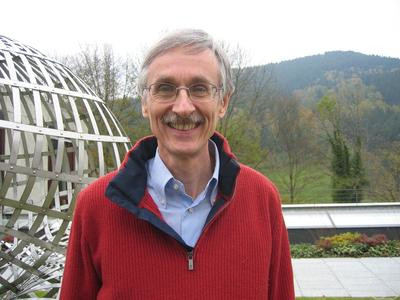 Foto di Hans-Rudolf Künsch